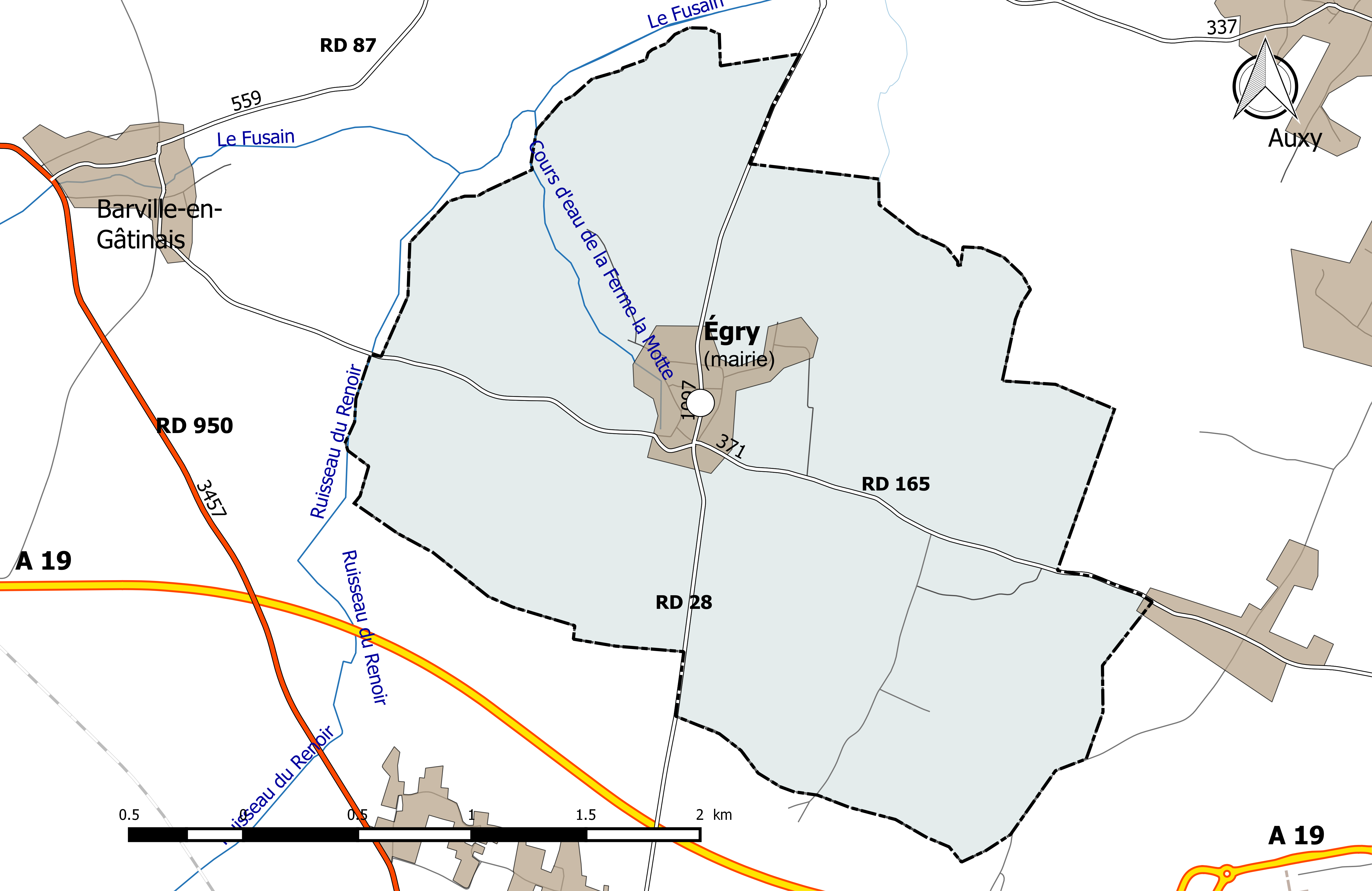 Carte du réseau routier de la commune de Courcelles (Loiret).